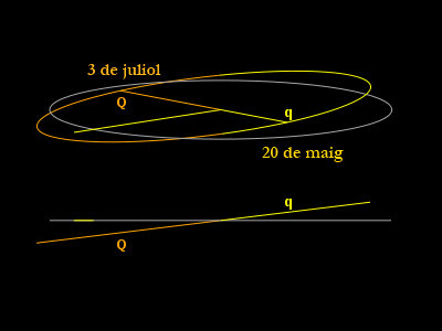 L'òrbita de Mercuri vista des del mode ascendent (a baix) i de 10° (a dalt). Traducció de File:ThePlanets_Orbits_Mercury_EclipticView.svg.